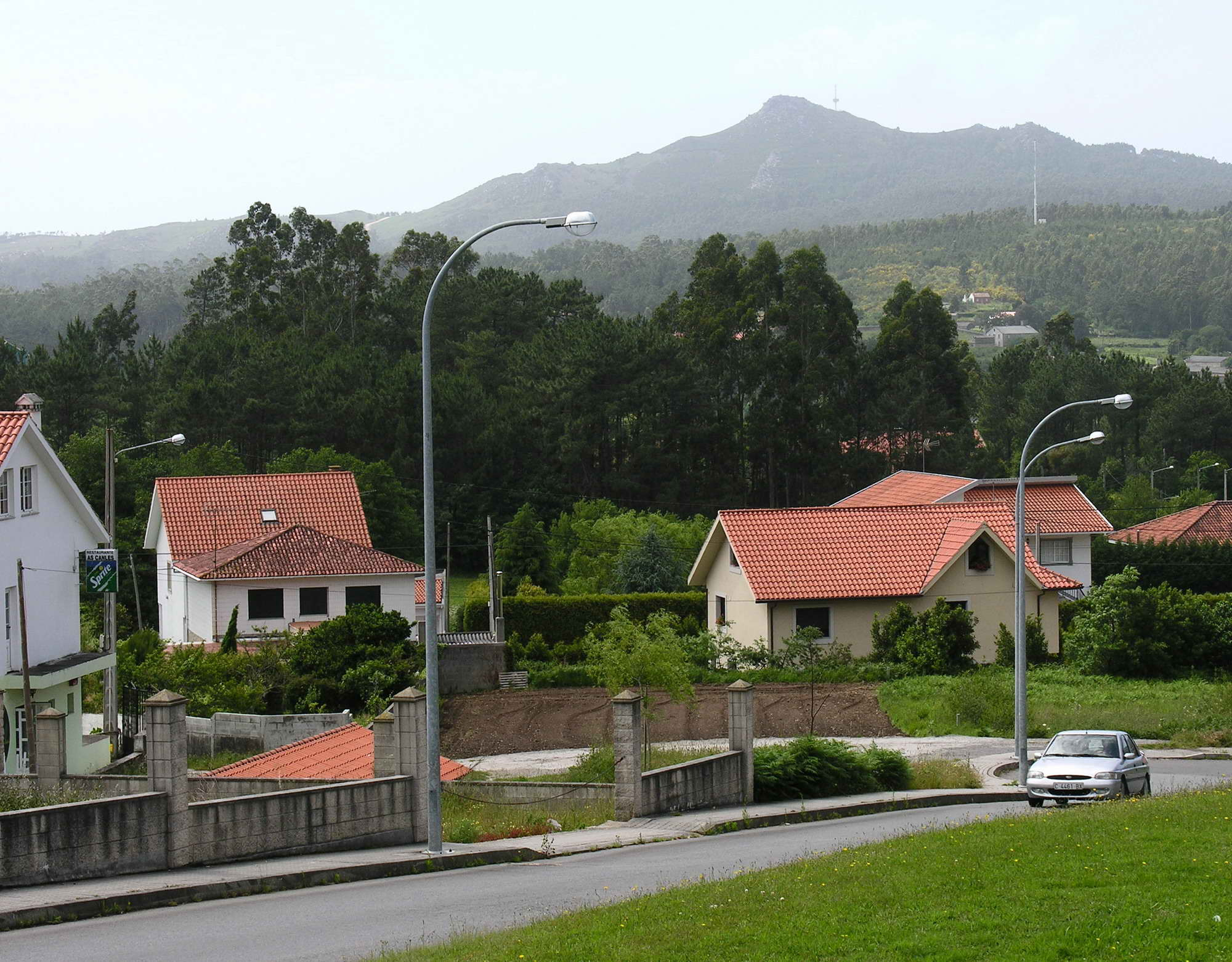 Vista da parroquia de Oleiros, Ribeira (Galicia) desde o hospital do Barbanza Publish by= Luis Miguel Bugallo Sánchez. Self made